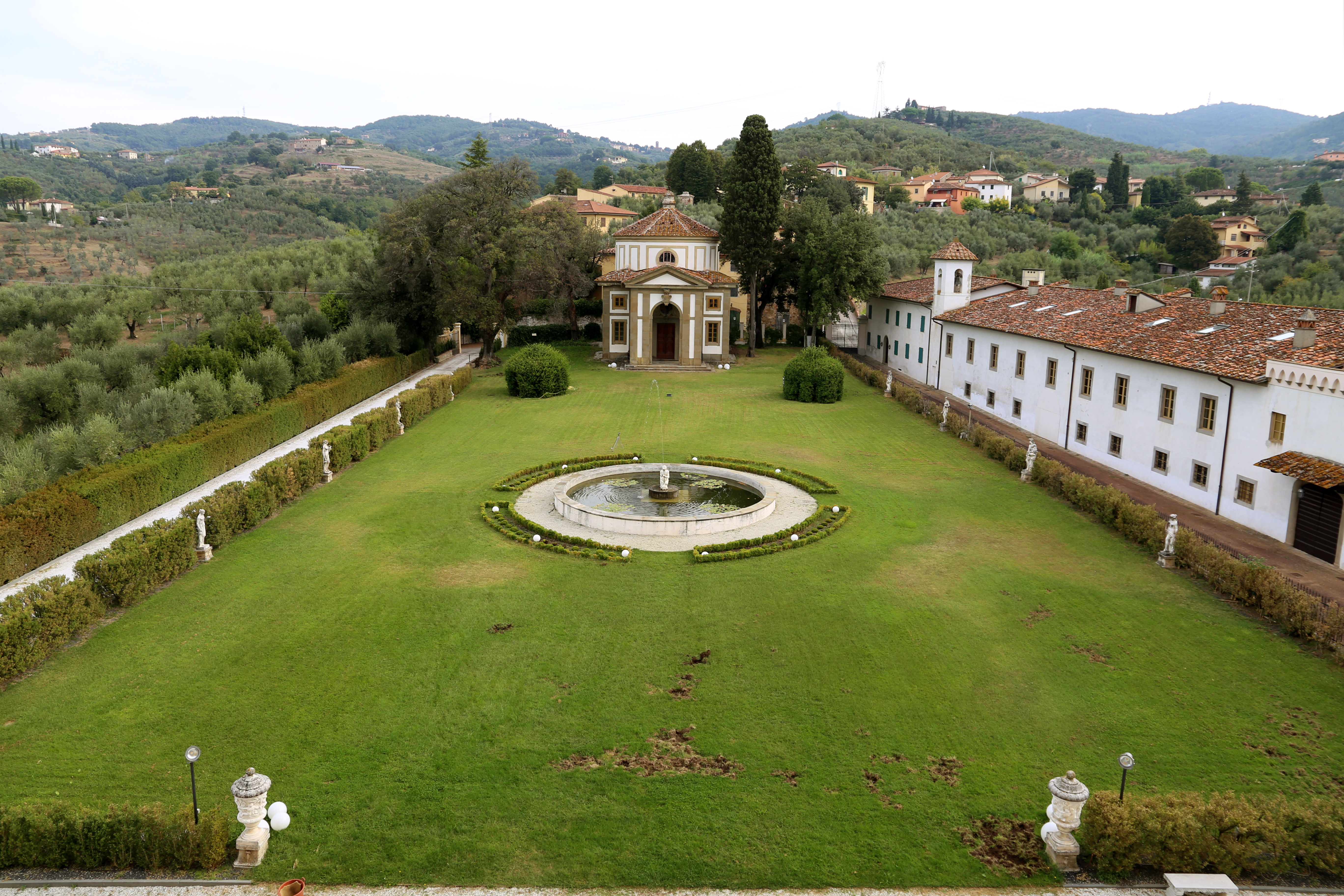 Villa Rospigliosi This is a photo of a monument which is part of cultural heritage of Italy.